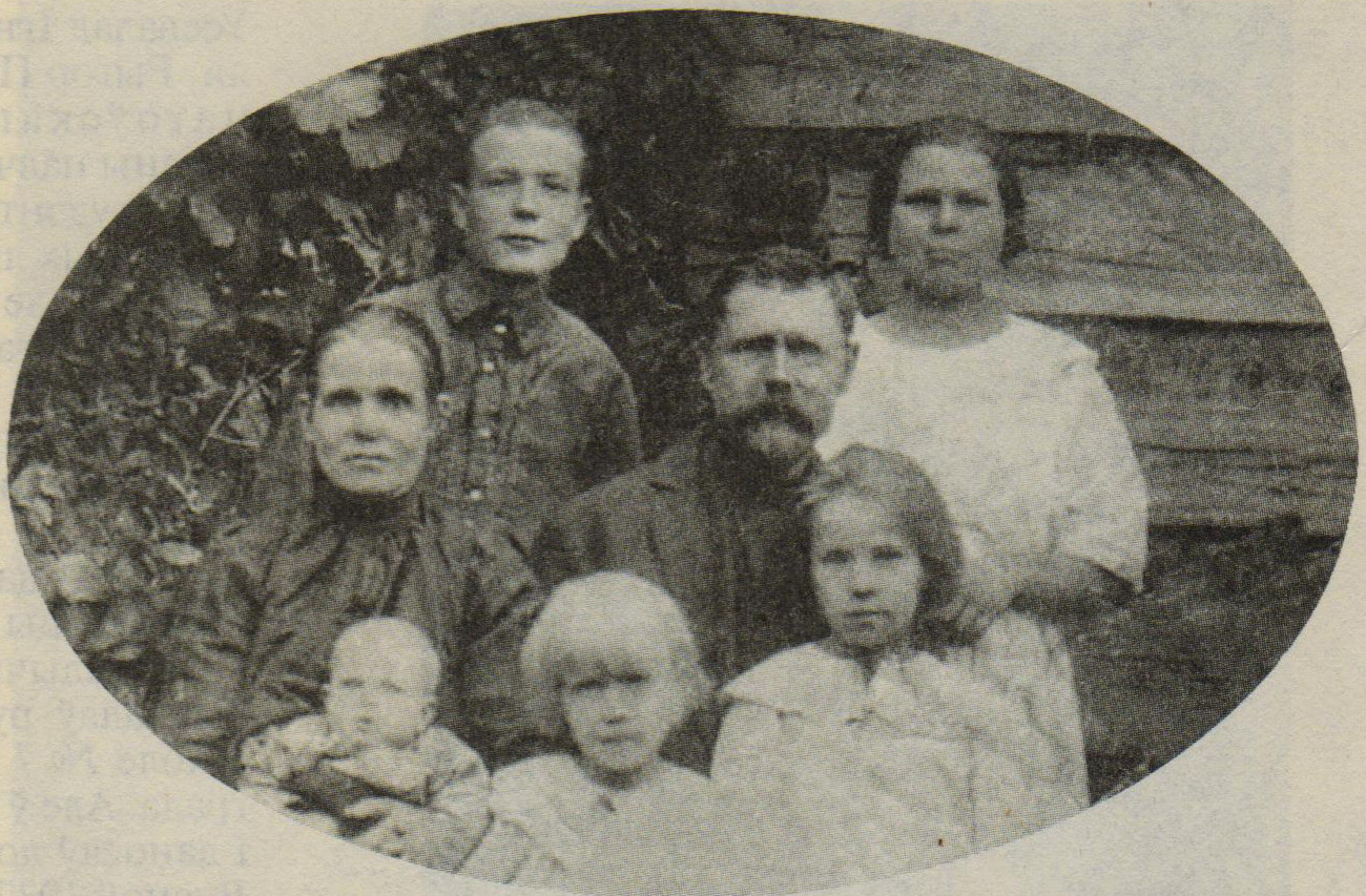 Беларуская (тарашкевіца): Рыгор Папараць з бацькам Макарам Міхайлавічам, маці Евай Станіславаўнай, сёстрамі Надзеяй, Тацянай, Валянцінай (сядзяць) і Ганнай (стаіць).